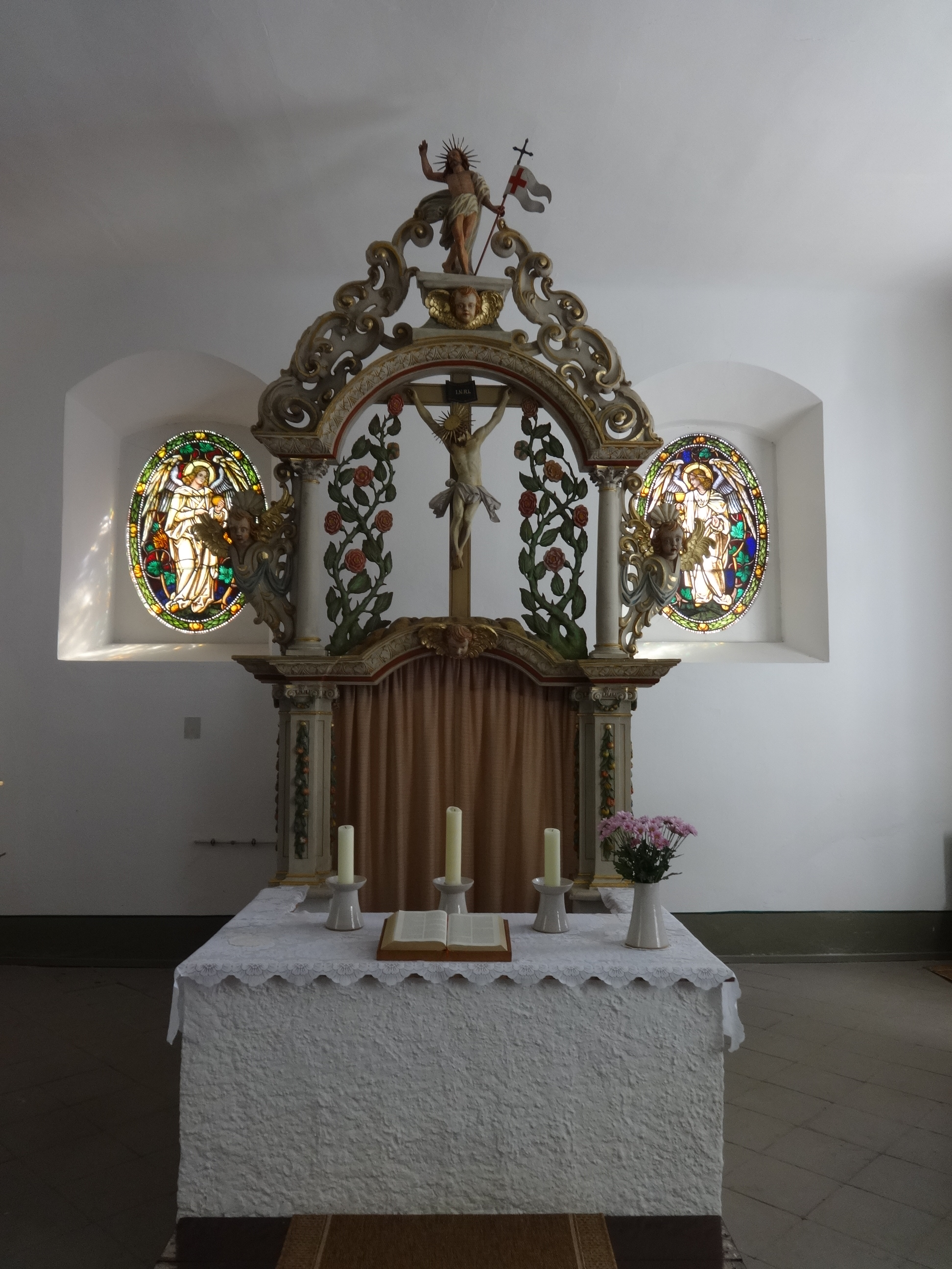 Die evangelische Dorfkirche Schenkendorf entstand vermutlich Ende des 14., Anfang des 15. Jahrhunderts. Die Feldsteinkirche wurde in den Jahren 1662 bis 1669 erheblich umgebaut. In seinem Innern befinden sich ein Altarrtabel und eine Kanzel aus dem 17. Jahrhundert sowie ein Schnitzaltar aus dem Jahr 1516. Er zeigt im geöffneten Zustand die Mondsichelmadonna, während im geschlossenen Zustand Nikolaus von Myra und Apollonia von Alexandria zu sehen sind.